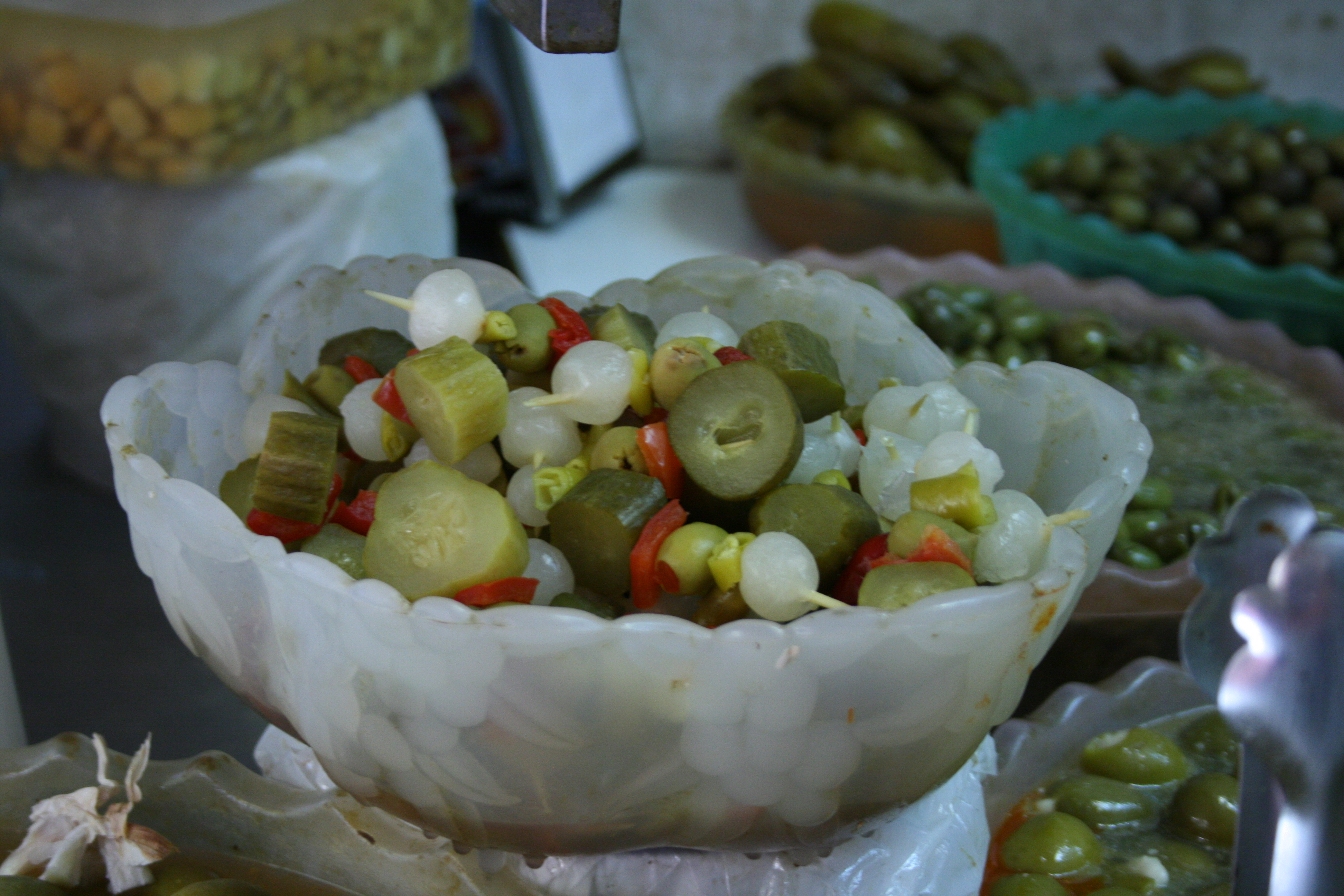 Banderillas encurtido